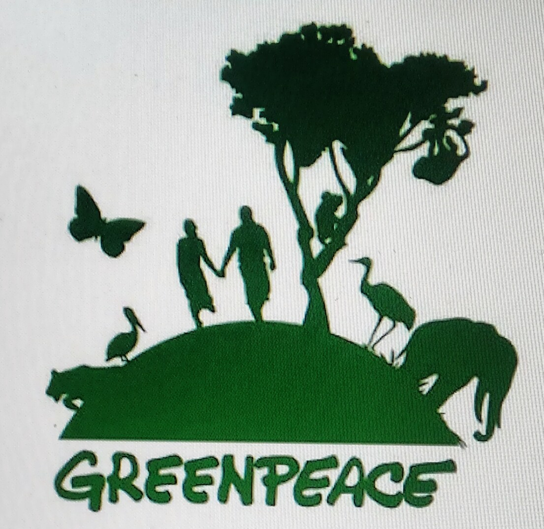 Imagen